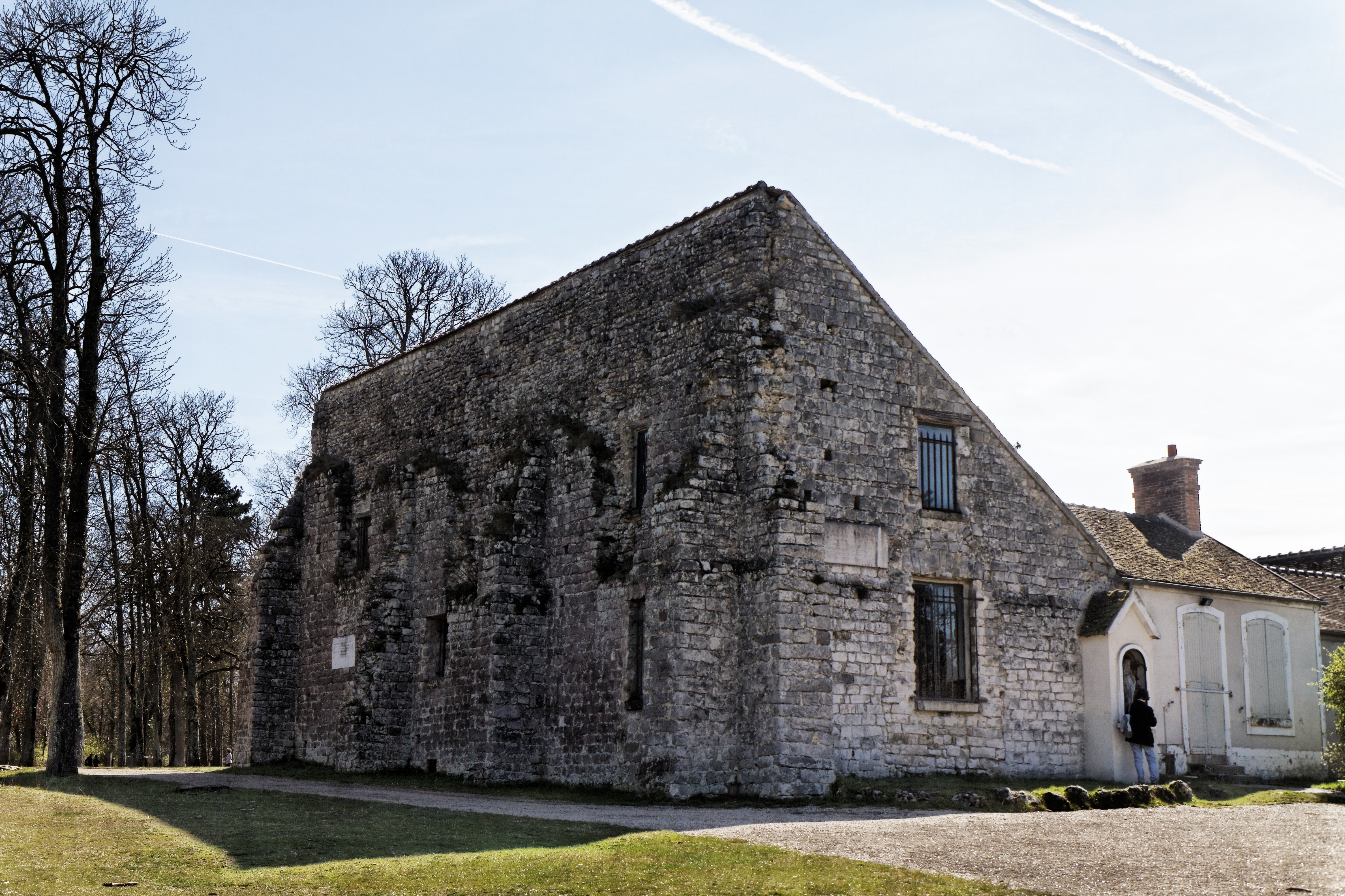 La chapelle de l'ermitage de Franchard dans la forêt de Fontainebleau et à proxmité des gorges du même nom.